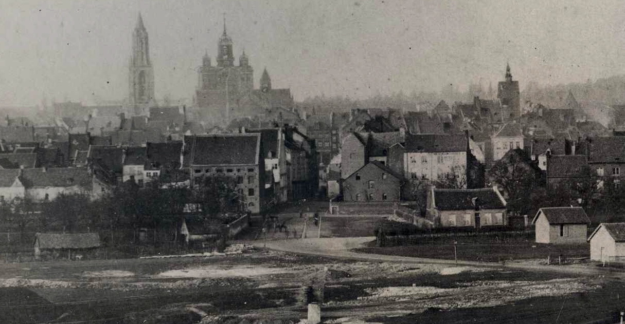 Gezicht op Wyck en Maastricht vanaf een van de hogere etages van Villa Wyckerveld, die in 1879-1880 werd gebouwd. Op de voorgrond de spoorlijn Maastricht-Luik (het station lag toen een stuk noordelijker). Daarachter de voormalige gordel van vestingwerken (in 1867 opgeheven). Daarachter het stadsdeel Wyck (nog zonder de Percée/Stationsstraat, die pas in 1881 zou worden aangelegd). Fotocollectie RHCL Maastricht, RAL P-0097-001.